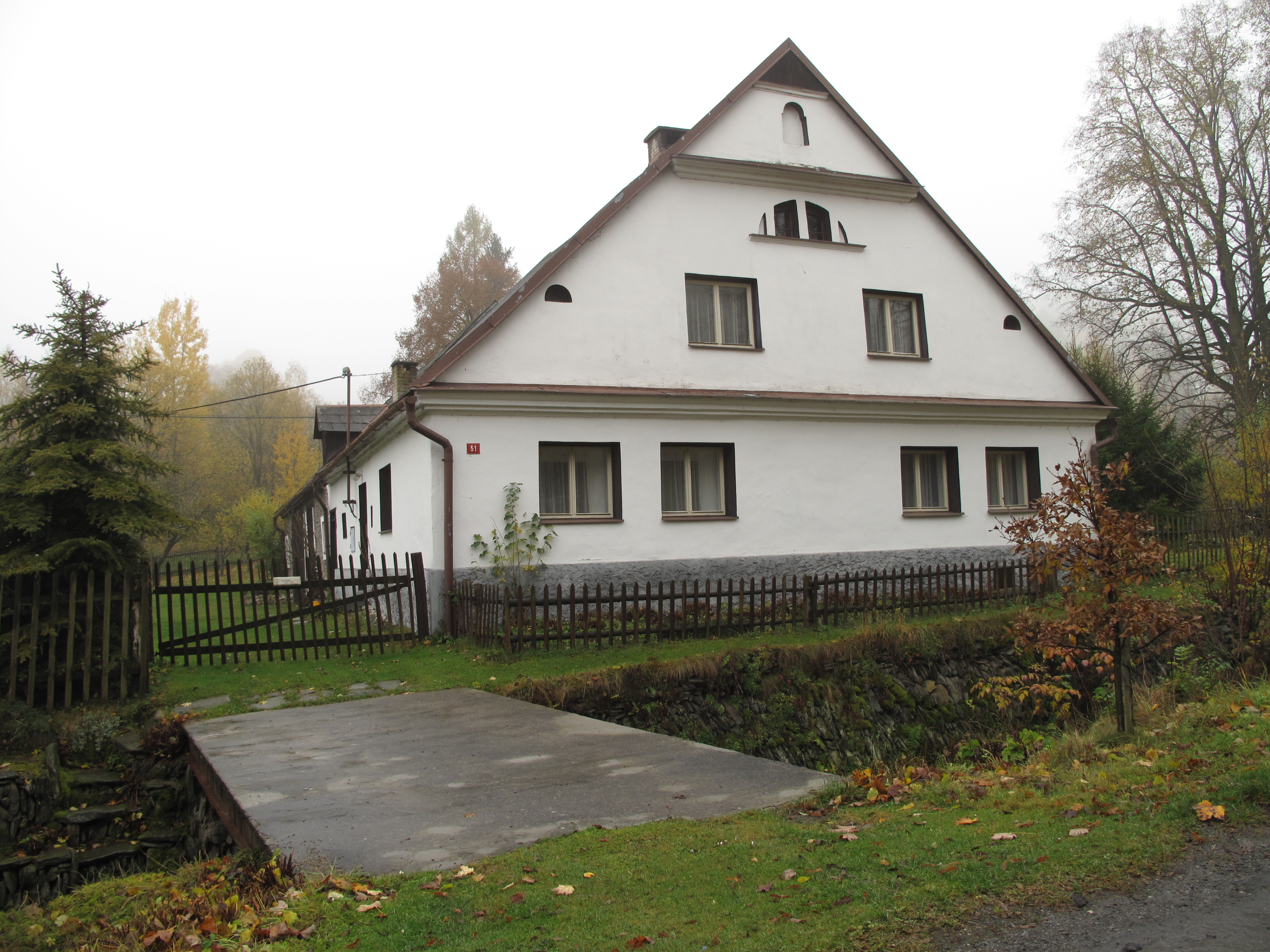 Valštejn. Okres Bruntál, Česká republika.